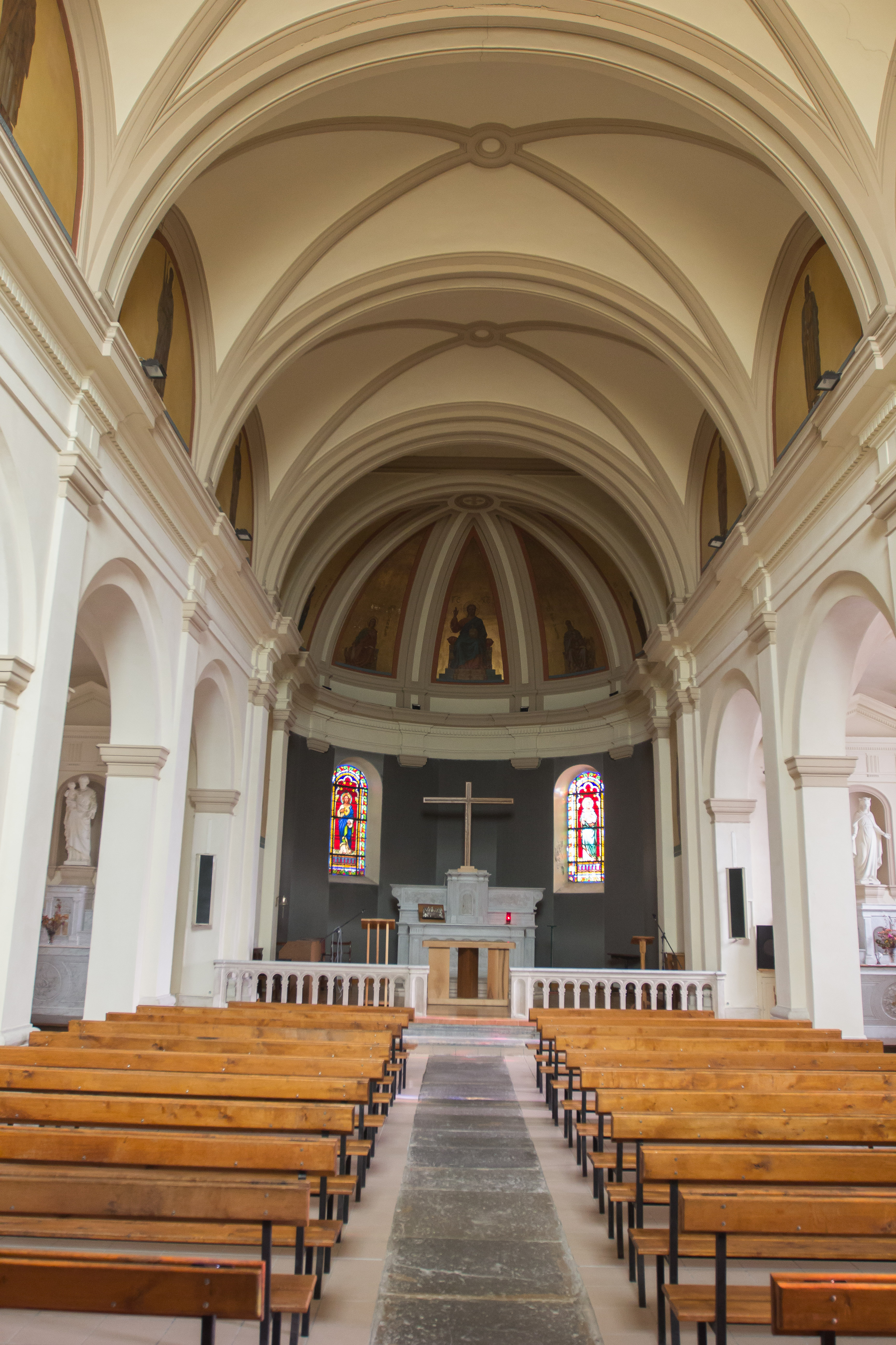 Intérieur de l'église Saint-Vincent de Voreppe, du hameau de Chevalon à Voreppe (Voreppe, Isère, France)